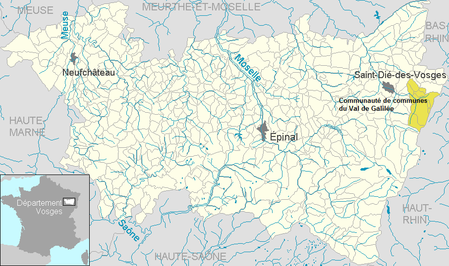 Communauté de communes du Val de Galilée dans le département des Vosges, Lorraine, France